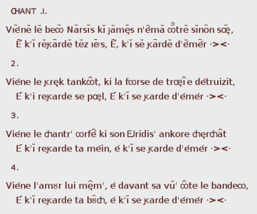 Chanson I_65 de Baïf